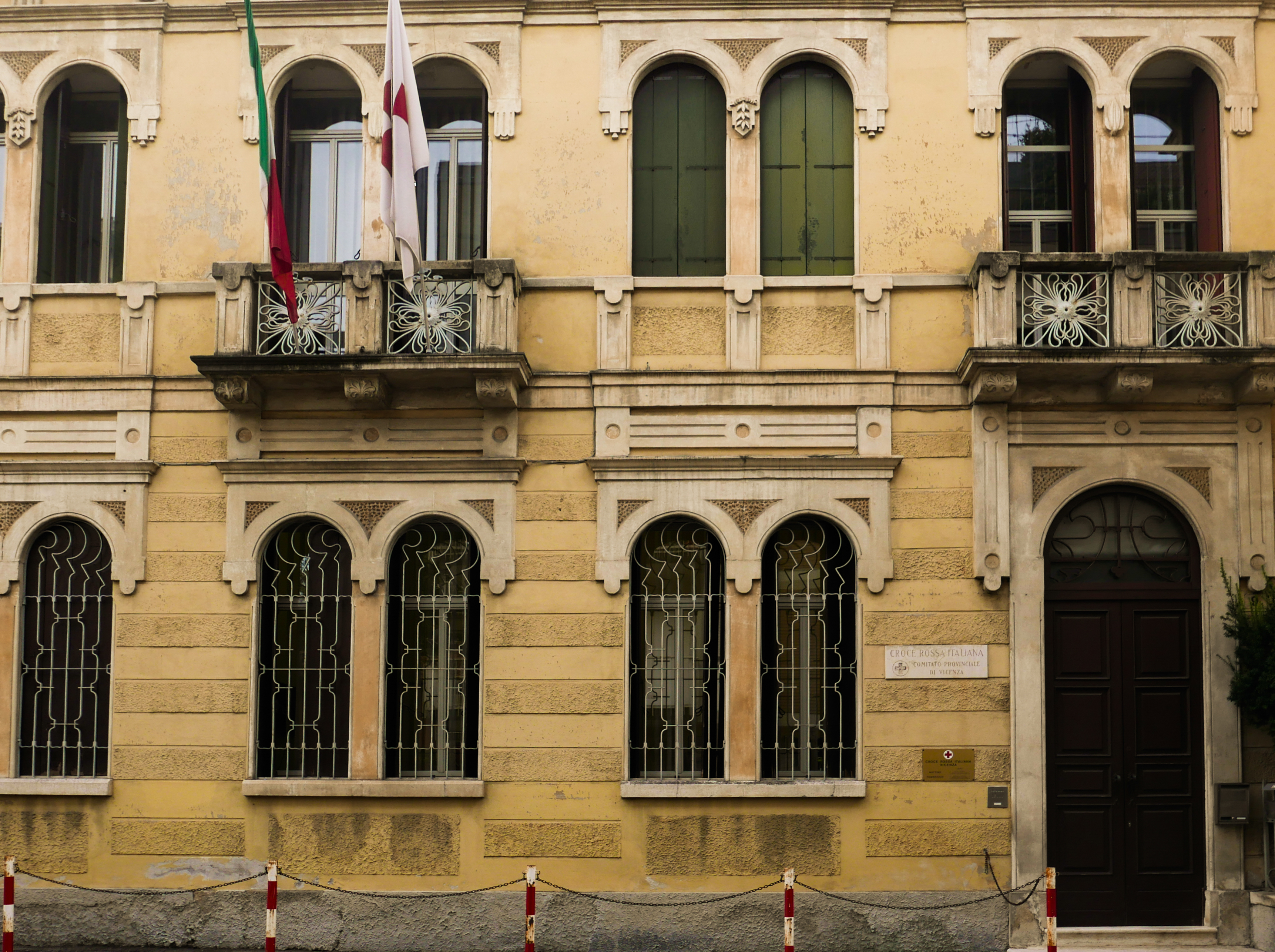 Sede della Croce Rossa Italiana in contrà Torretti